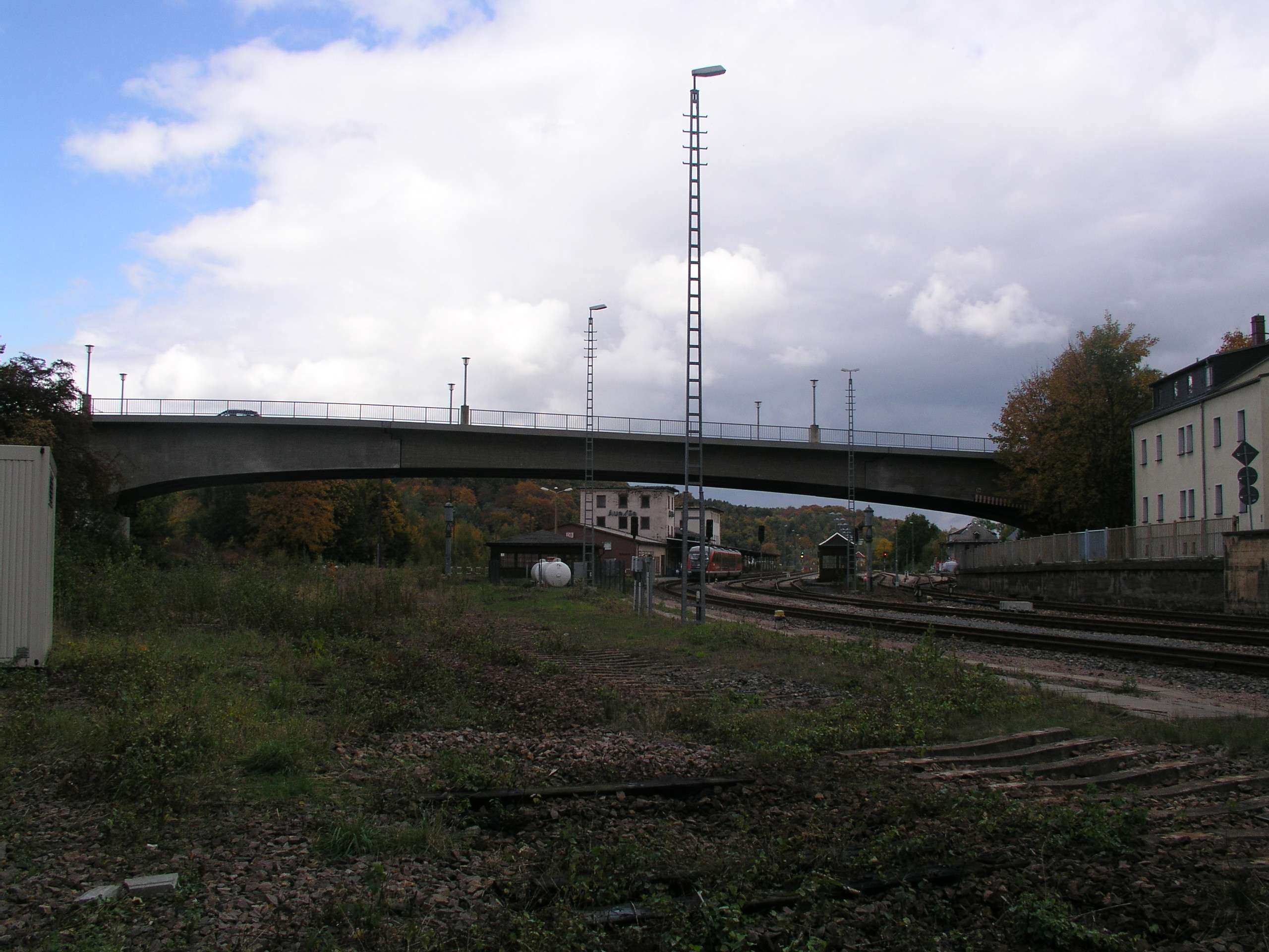 Bahnhofsbrücke, Gesamtansicht (3)